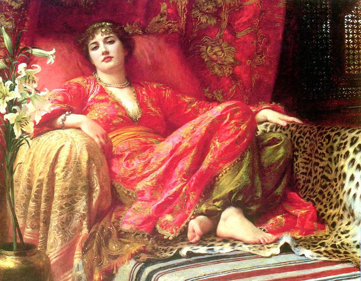 Detail image